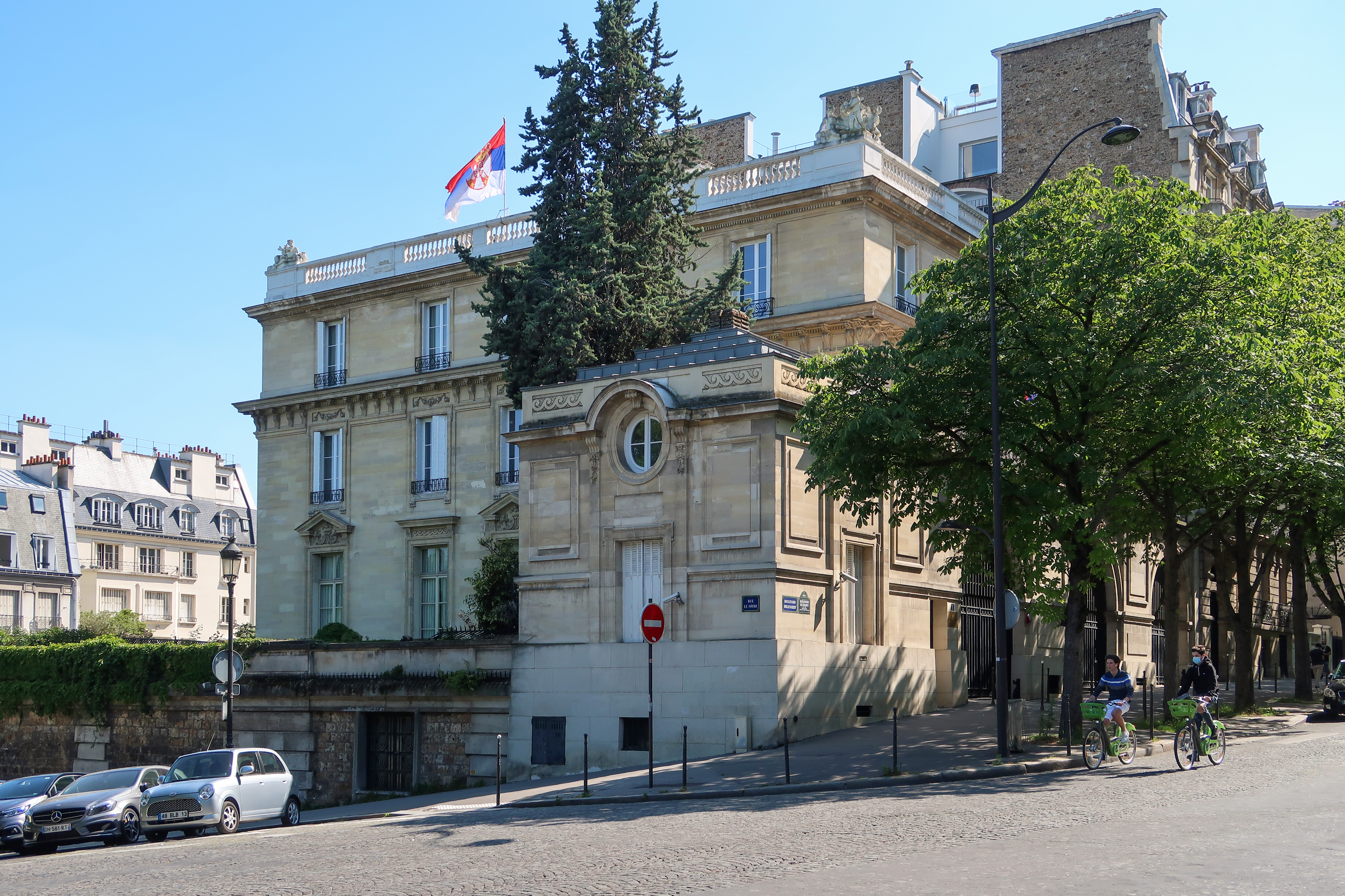 Hôtel de La Trémoille, résidence de l'ambassadeur de Serbie en France, 1 boulevard Delessert, au croisement avec la rue Le Nôtre (Paris, 16e).